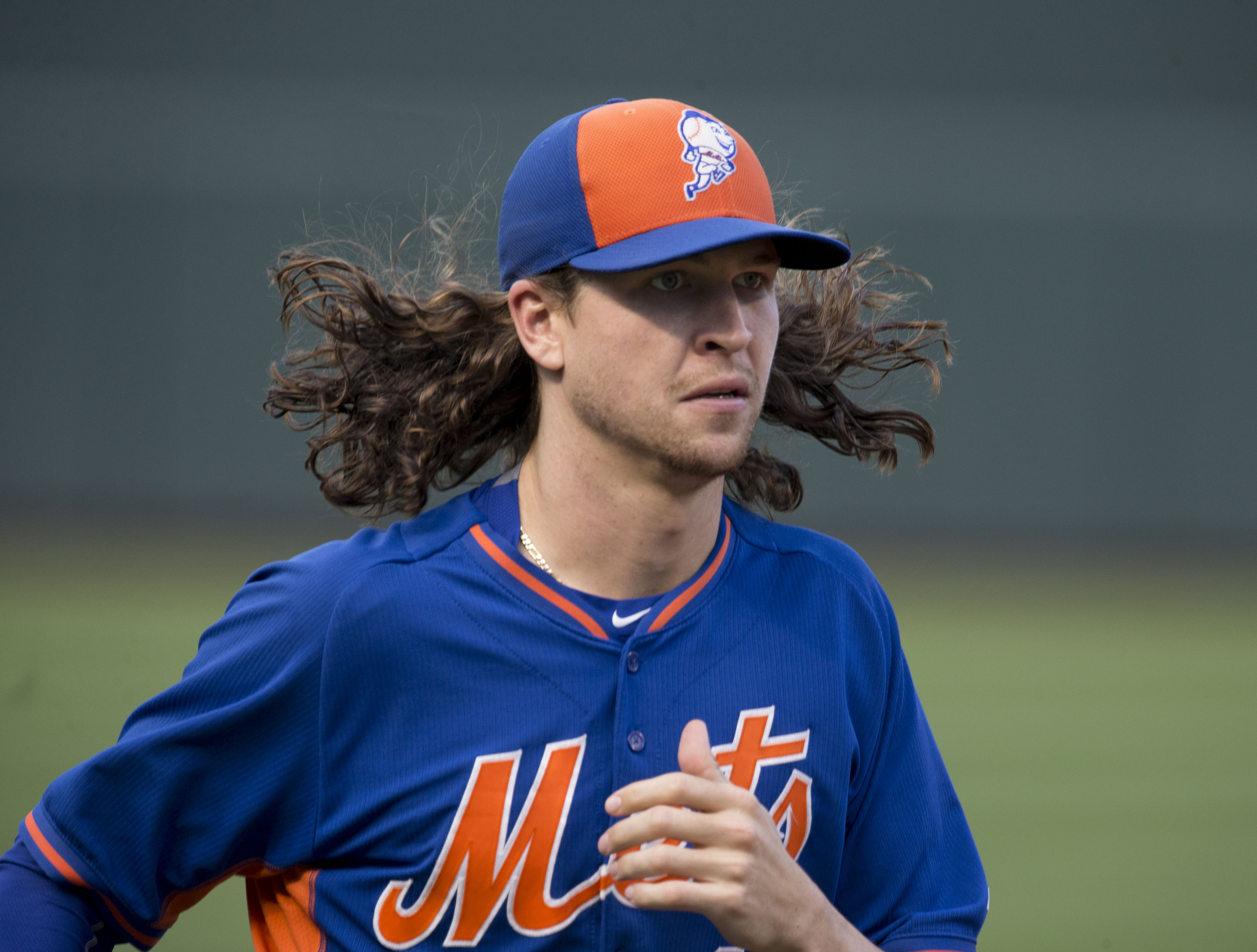 Mets at Orioles 8/19/15